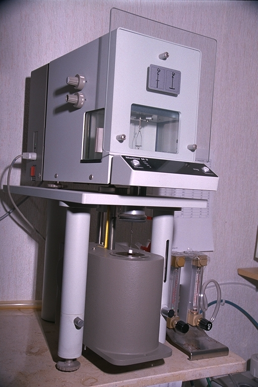 Meßplatz für die Thermogravimetrische Analyse